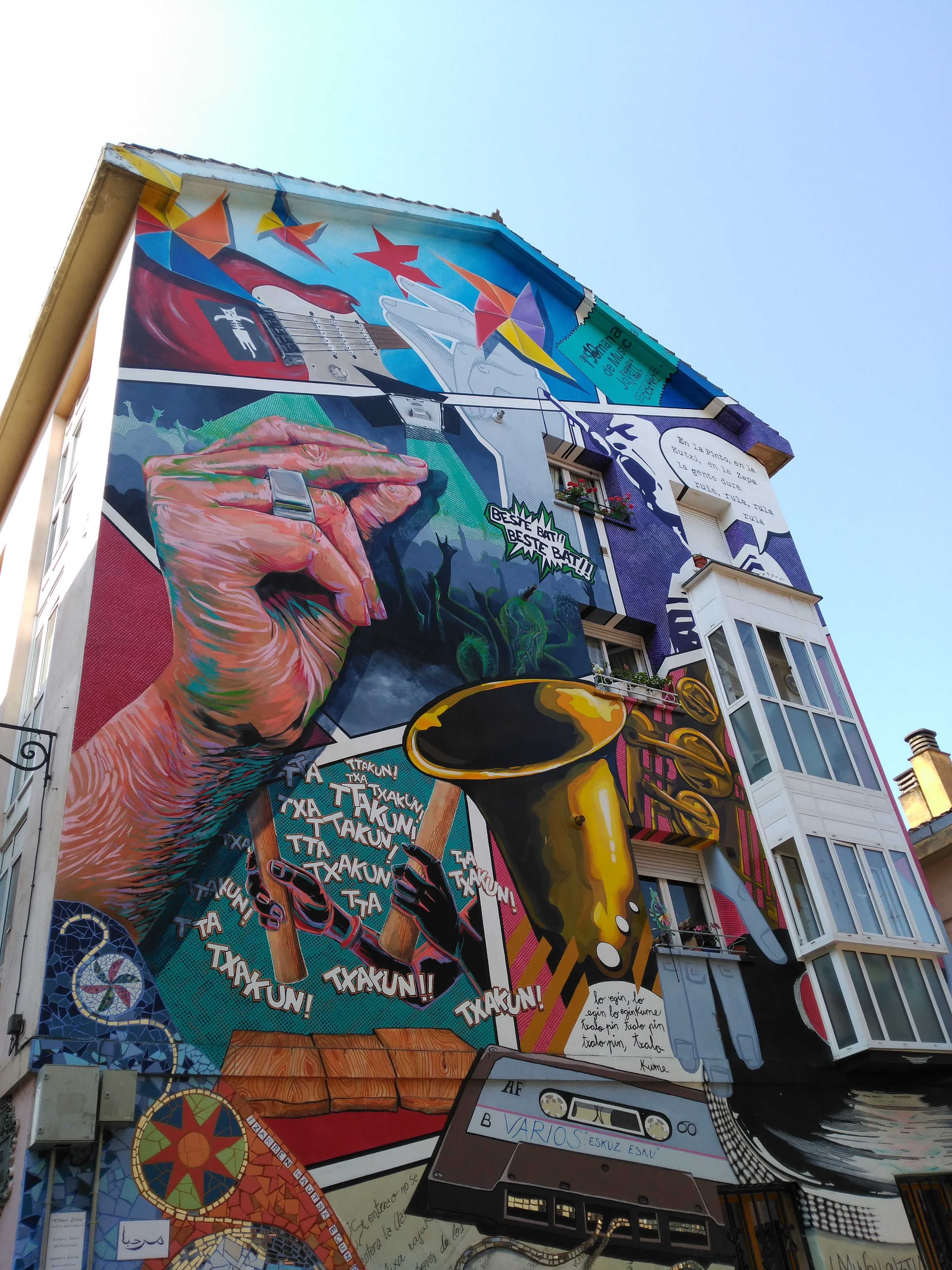 Año: 2010 Título: Eskuz Esku (Zapatería) Dirección: Marta Gil Estremiana Asistente: Jaime Alejandro Cornelio Yacamán Asistente en Prácticas: Julen Morillas Cabezudo